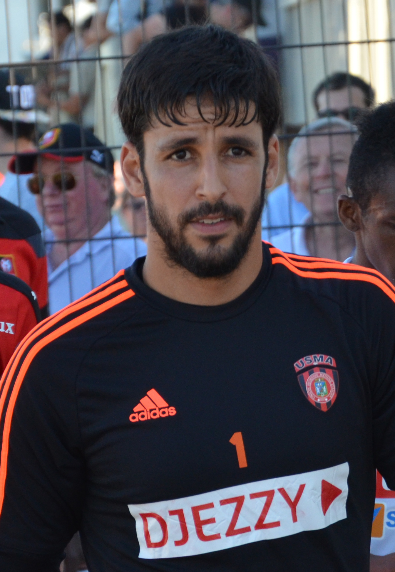 Photographie prise lors du match opposant le Stade rennais à l'USM Alger en match amical au stade Paul-Audrin de Dinard le 16 juillet 2016. Ici, Mohamed Lamine Zemmamouche.